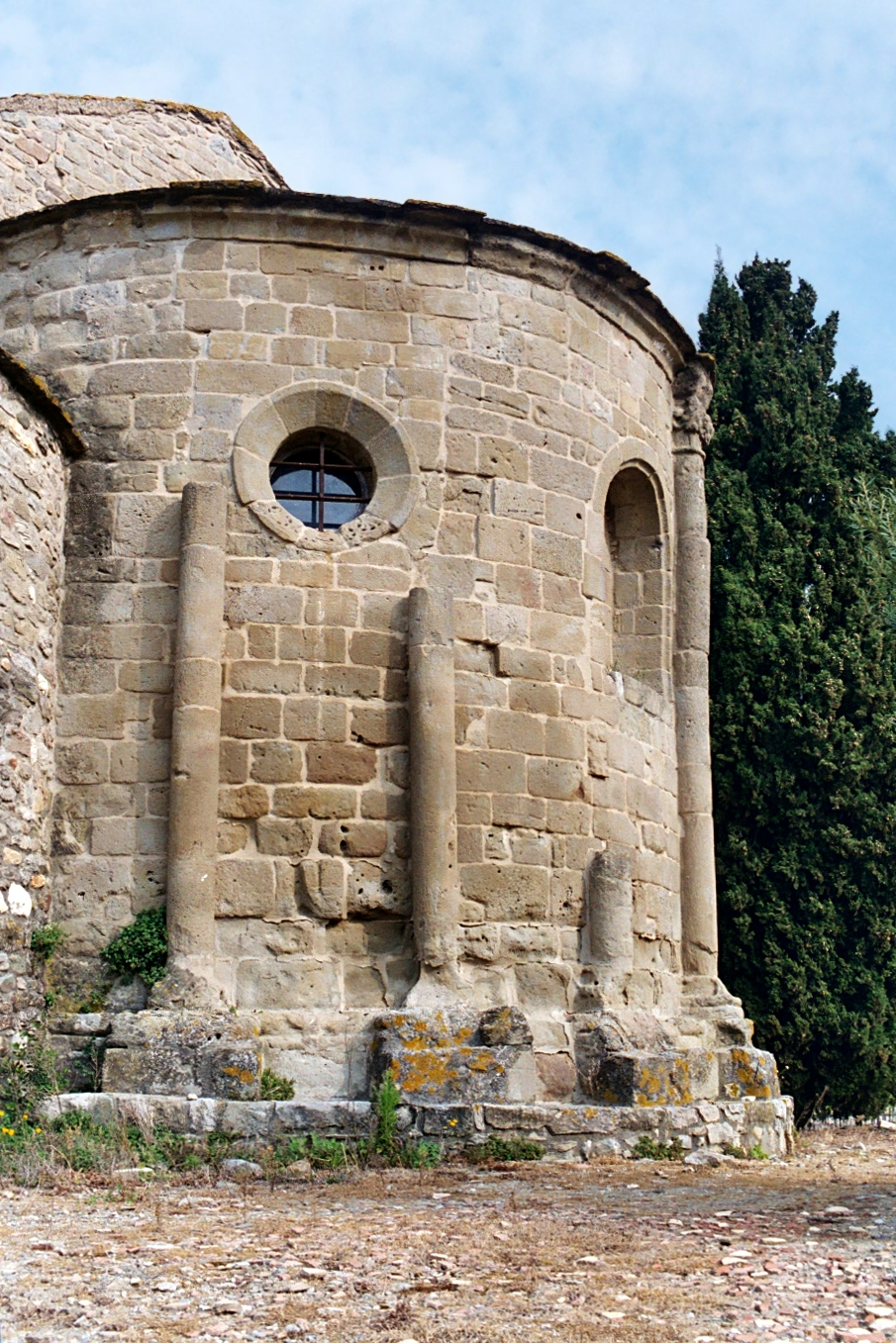 France - Languedoc - Aude - Azille - Chapelle Saint-Étienne de Vaissière